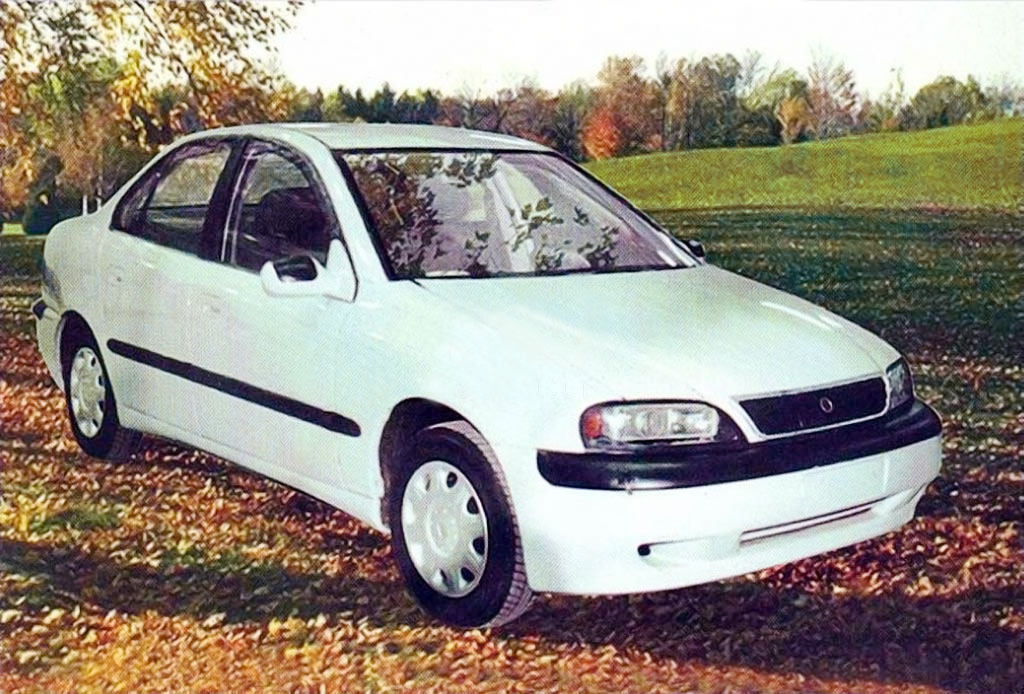 نسخه اولیه (پروتوتایپ) خودروی سمند، بر روی پلتفورم پژوی 405، به اسم پیکان جدید